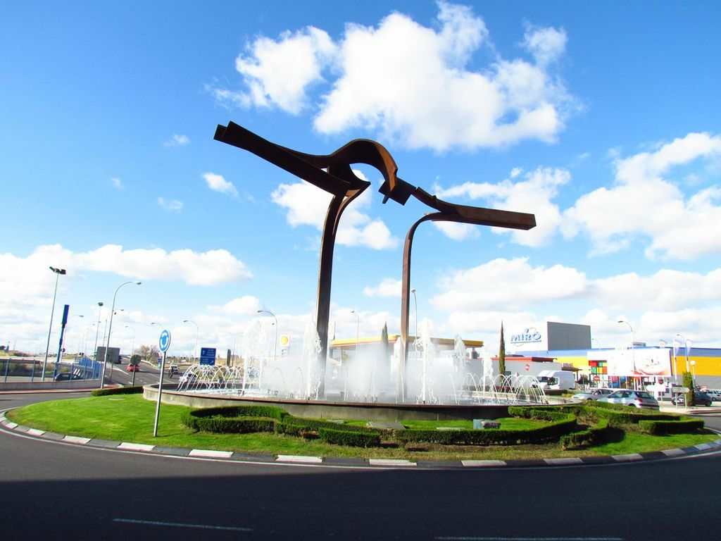 Carlos Albert. Puerta de la Tolerancia, 2005. Excmo. Ayuntamiento de Parla, Madrid